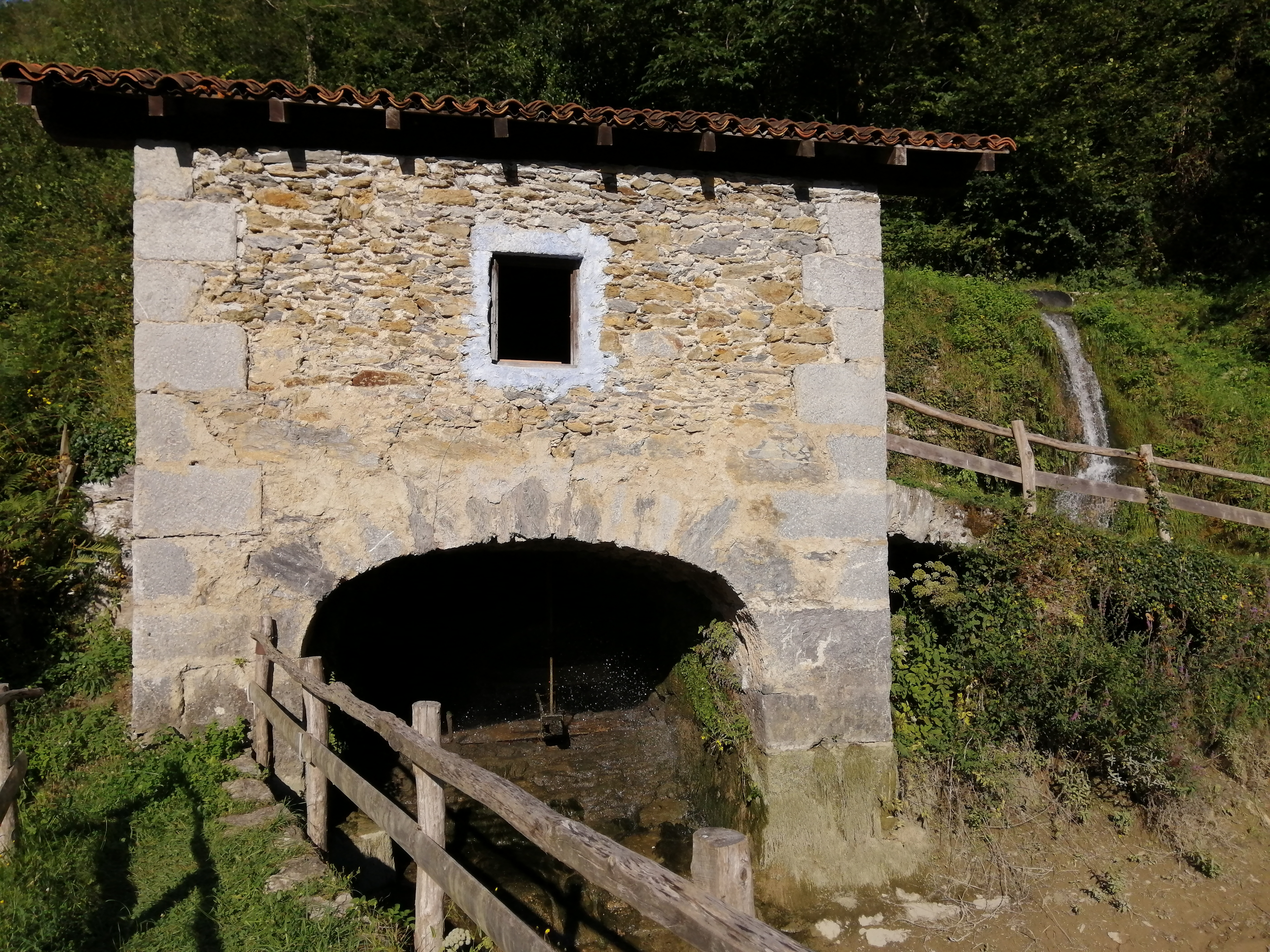 Errota, Lastur, Itziar, Deba